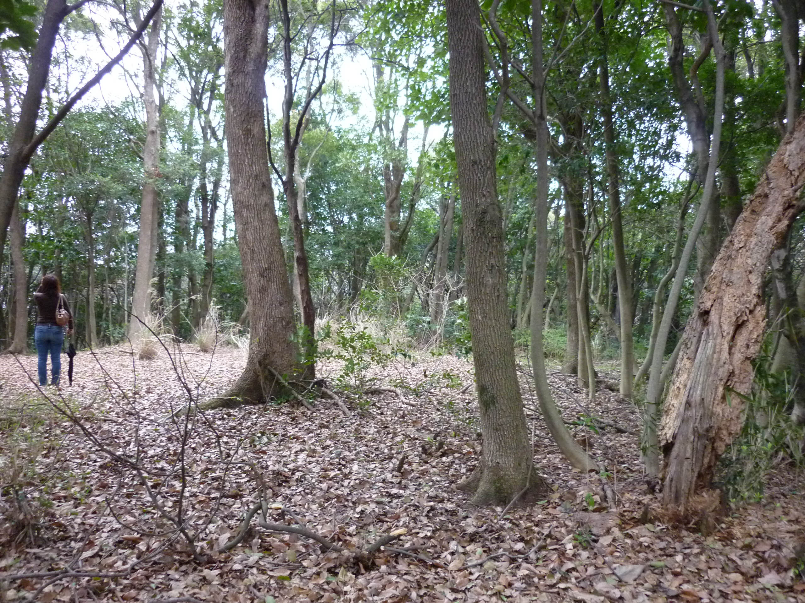 主郭